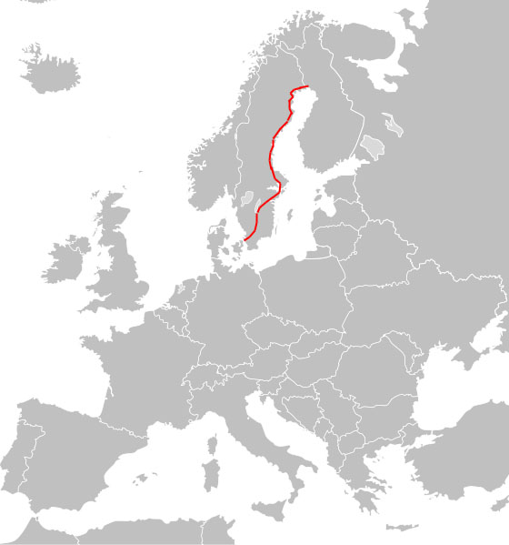 European route 4